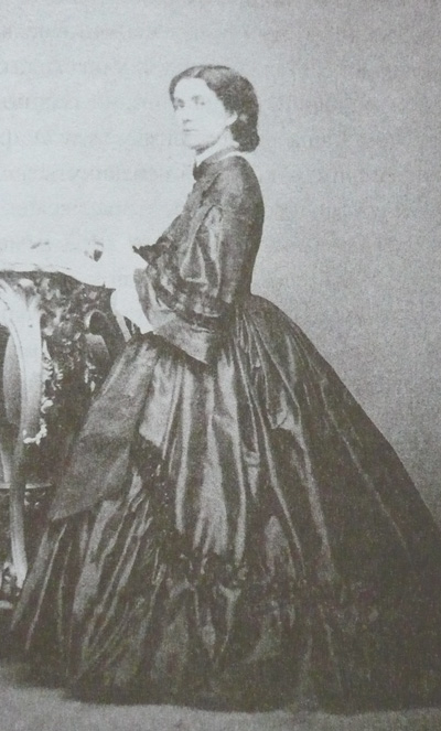 Фредерикс София Петровна (1824—1882), дочь Петра Андреевича Фредерикса